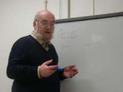 Goran Švob